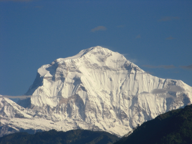 DhaulagiriDhaulagiri massif as seen from Ramrekha area of Baglung Bazar